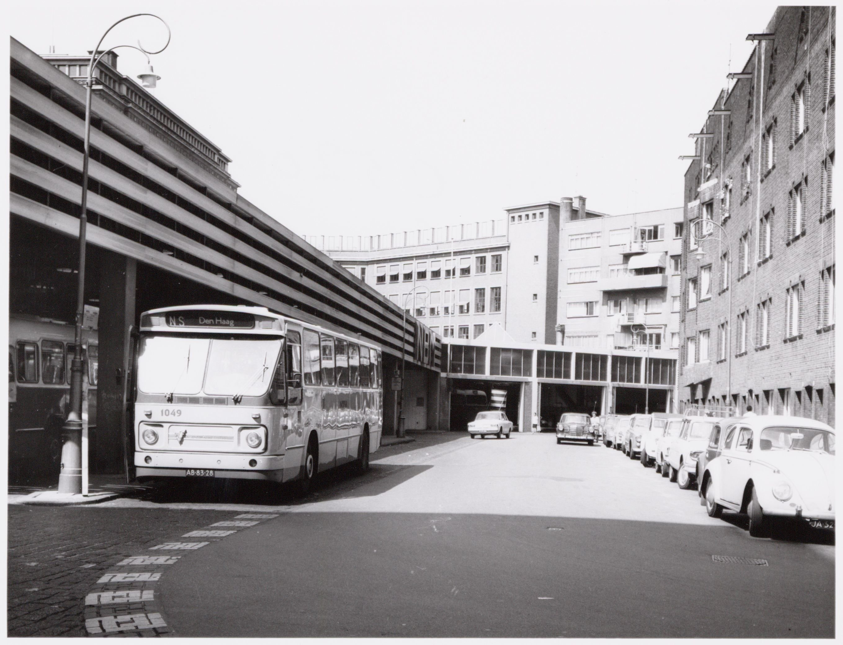 Titel Van Musschenbroekstraat Beschrijving Links het busstation. Documenttype foto Vervaardiger Arsath Ro'is, J.M. Collectie Collectie Stadsarchief Amsterdam: foto's eigen fotodienst Datering 12 augustus 1968 Inventarissen Geografische aanduiding Straat Van Musschenbroekstraat Rechthebbende Stadsarchief Amsterdam Gebruiksvoorwaarden Deze afbeelding is vrij beschikbaar voor hergebruik. Afbeeldingsbestand 010122037090 Kwaliteit Hoog